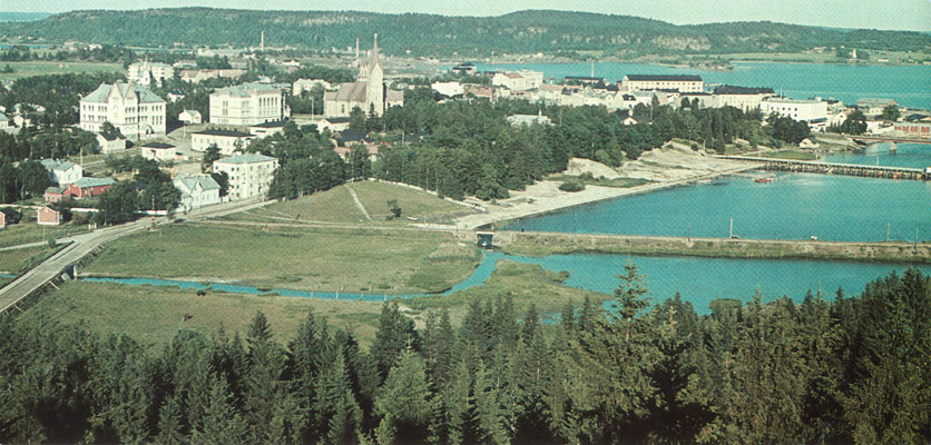 Вид на город